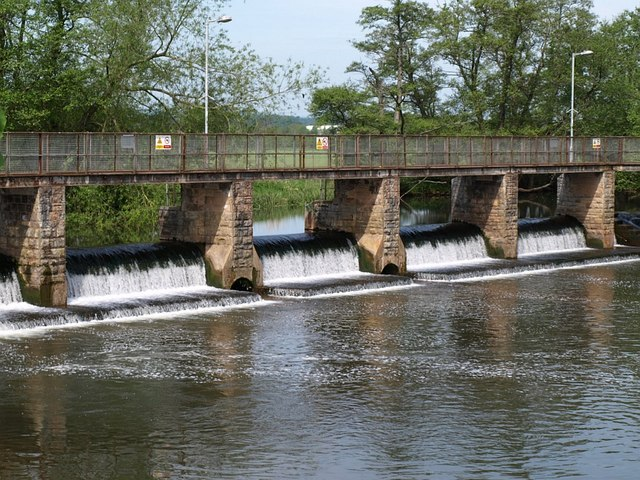 French Weir, River Tone